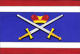 prapor obce Korytná